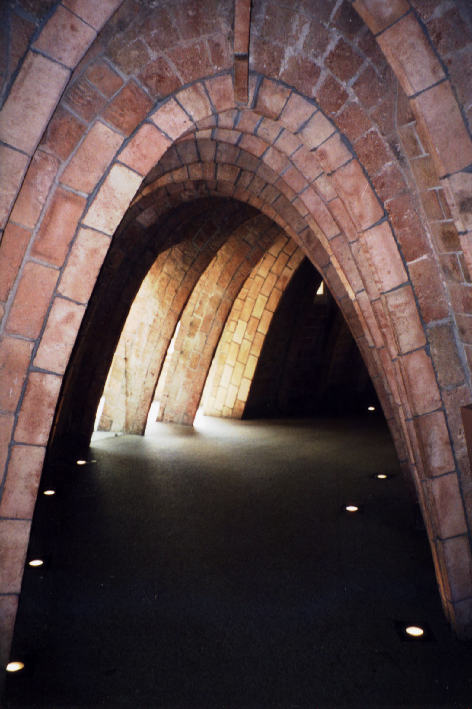 Arcos con forma de catenaria bajo la terraza de la Casa Milá (o La Pedrera) en Barcelona, España.